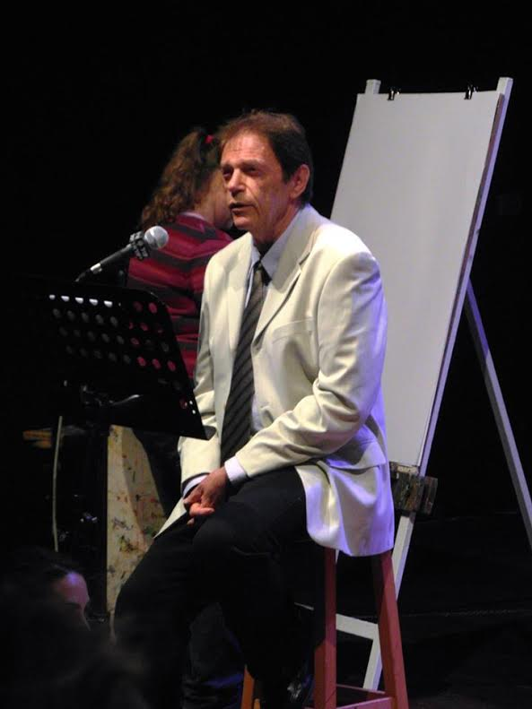 Arye Yass